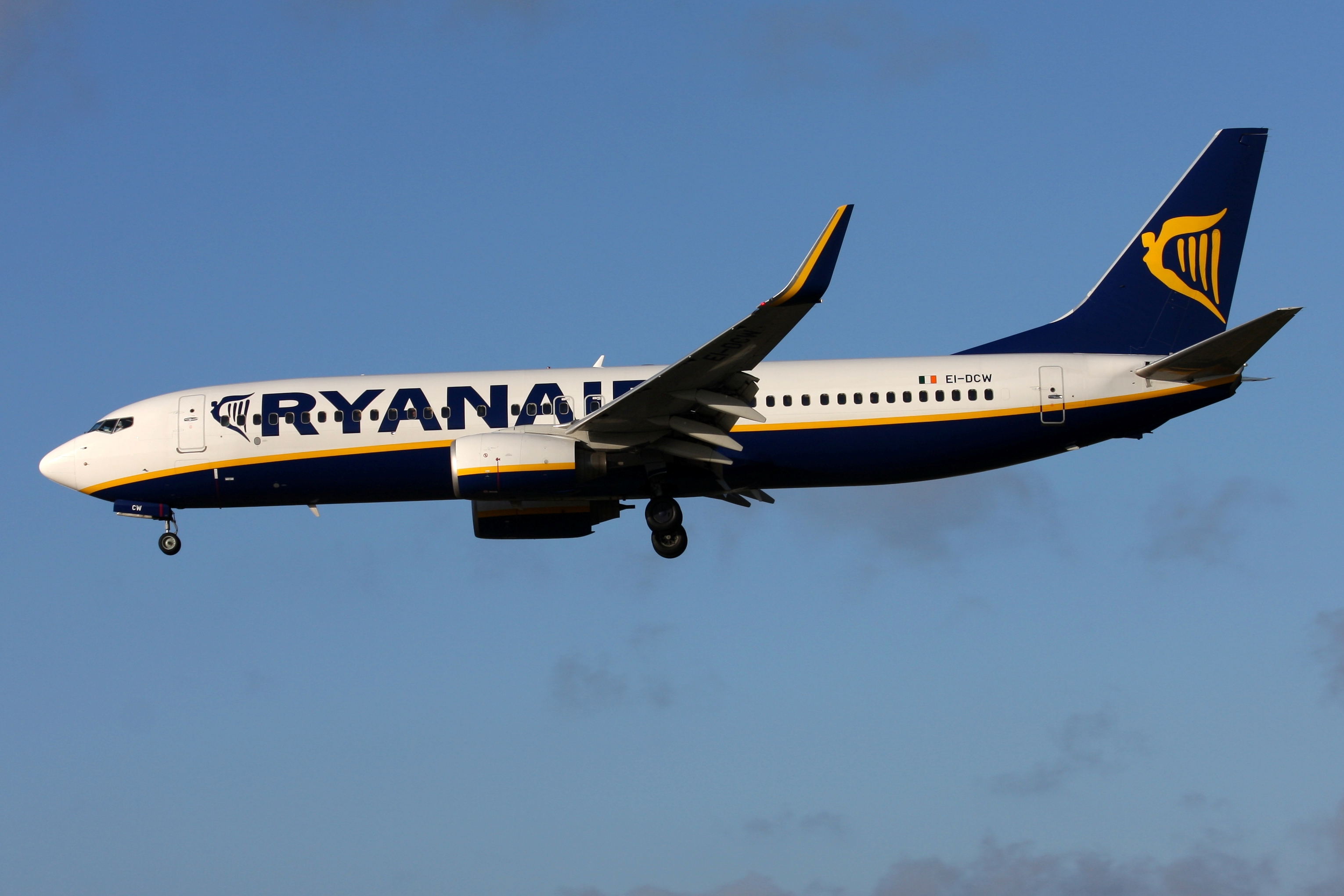 Ryanair B737 EI-DCW